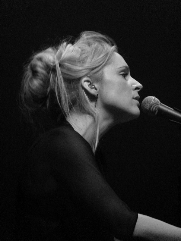 Agnes Obel au Cirque Royal, Bruxelles par Filip Van Lerberge.